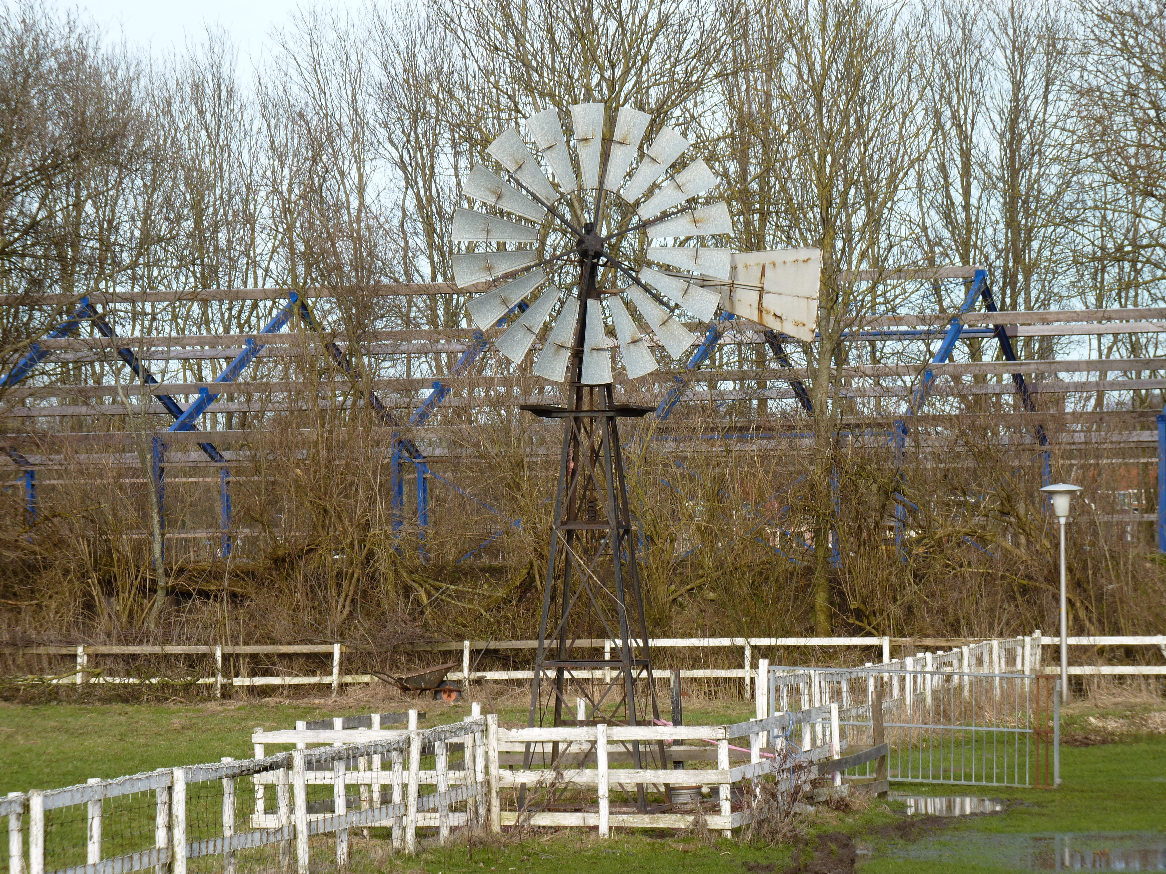 Cornjum Windmotor